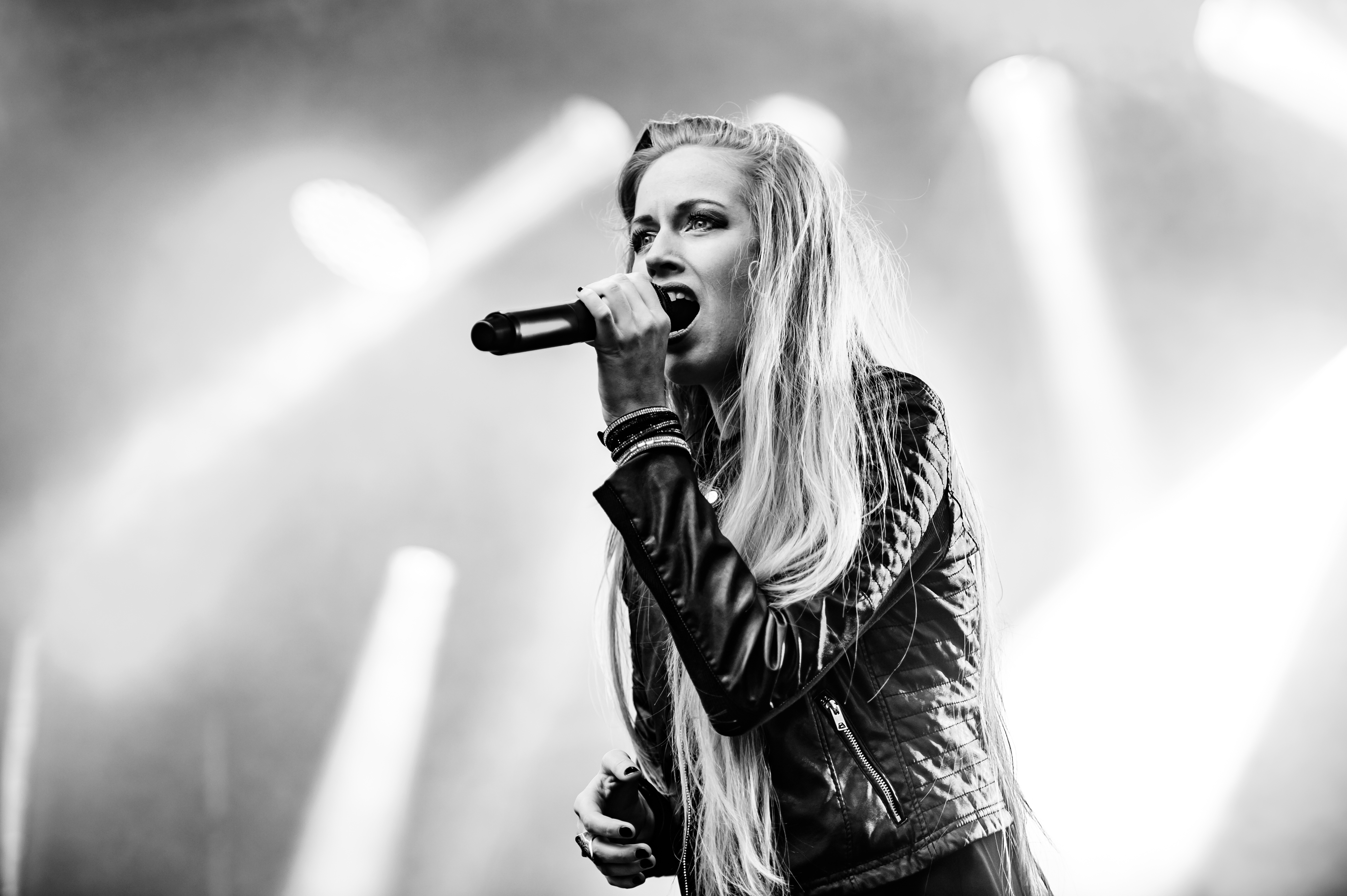 'Castle Rock 2017; Mülheim an der Ruhr': 'Aeverium'